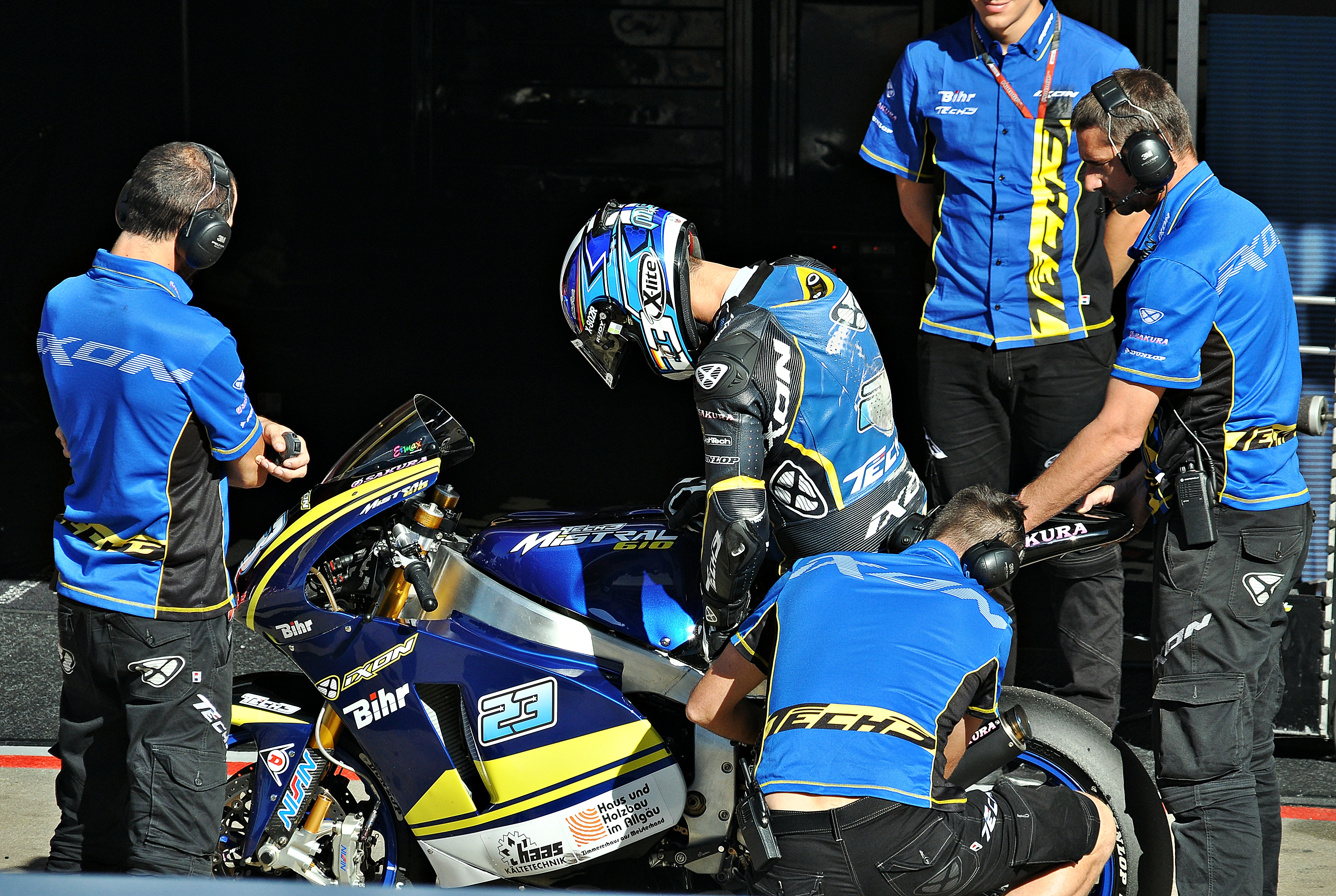 gran premio de cataluña